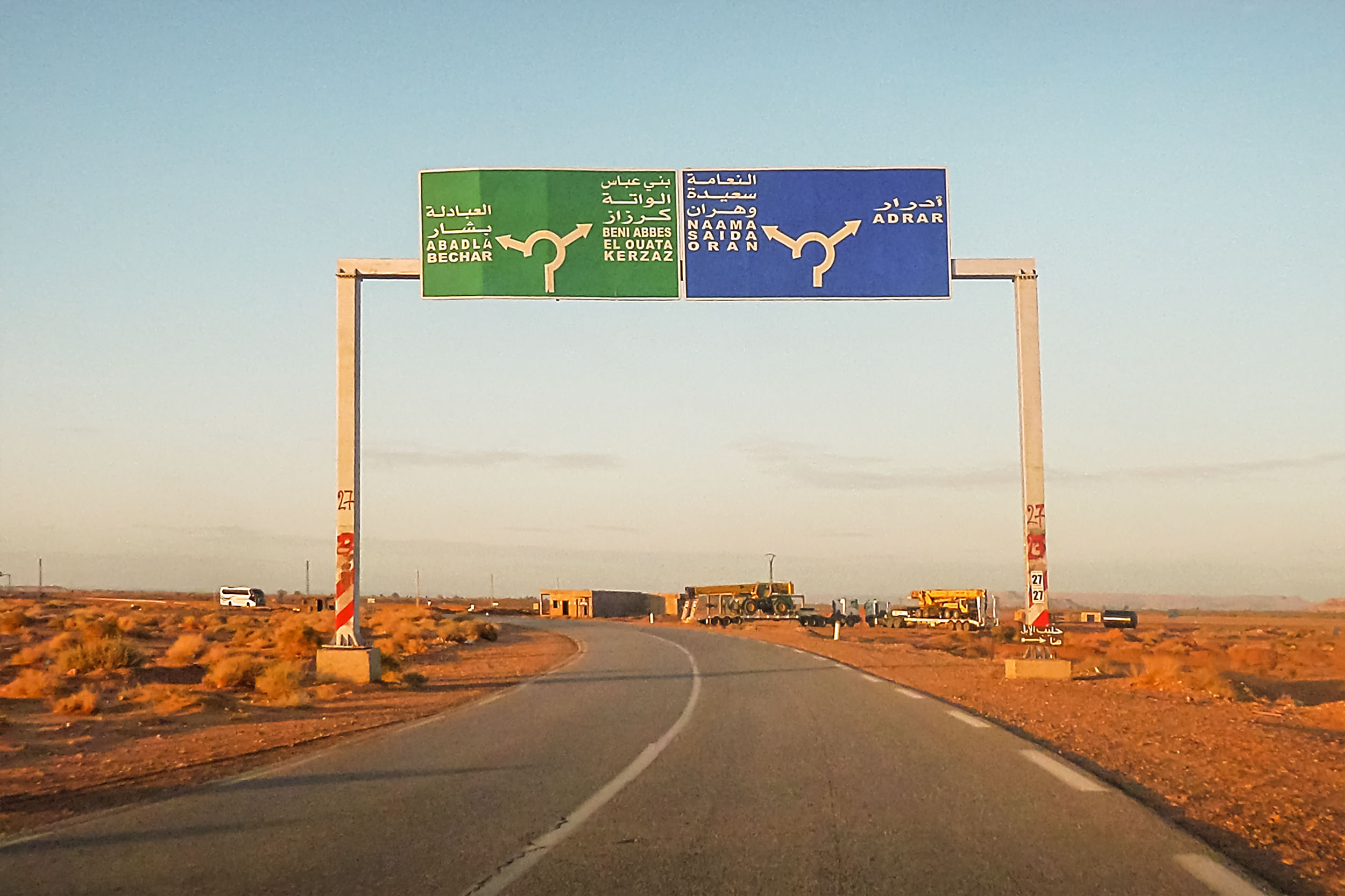 Abadla - wilaya de Béchar العبادلة - ولاية بشار